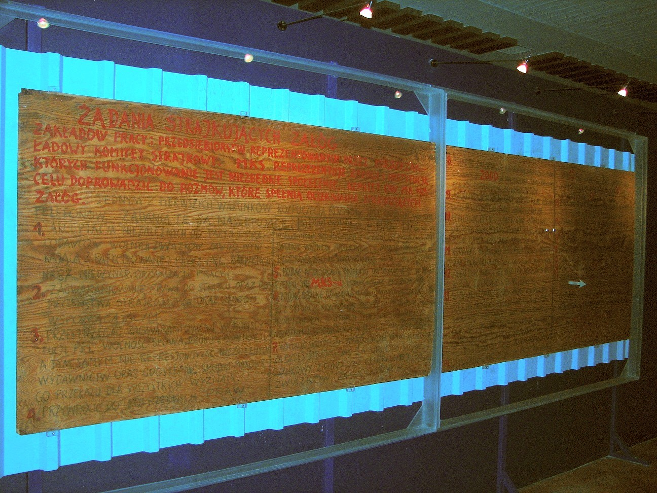 Gdańsk. Wystawa 'Drogi do Wolności'. Tablice z 21 postulatami MKS